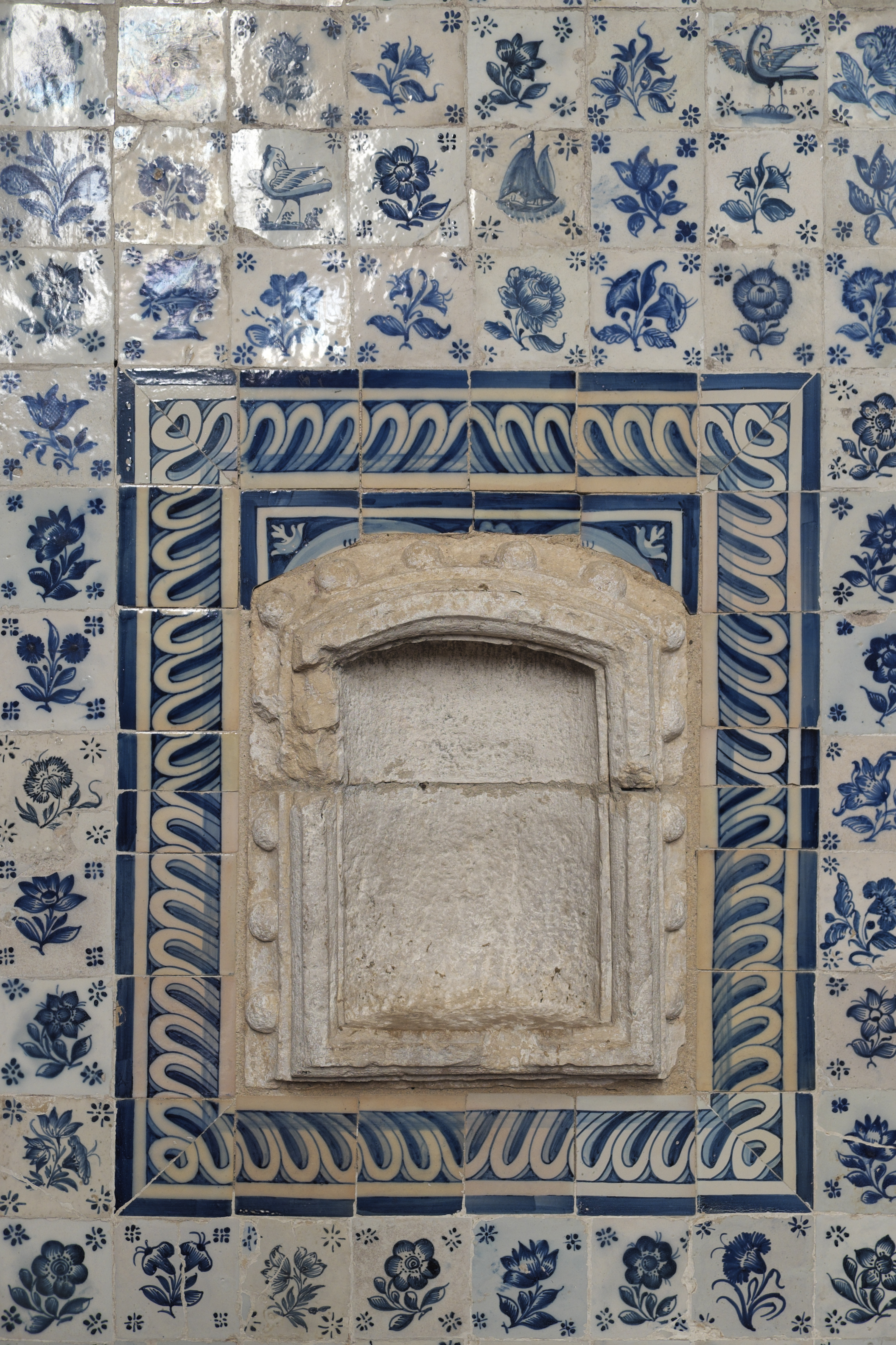 Kirche Nossa Senhora da Conceição (Unbefleckte Empfängnis) in Golegã im Distrikt Santarém in Portugal, Piscina